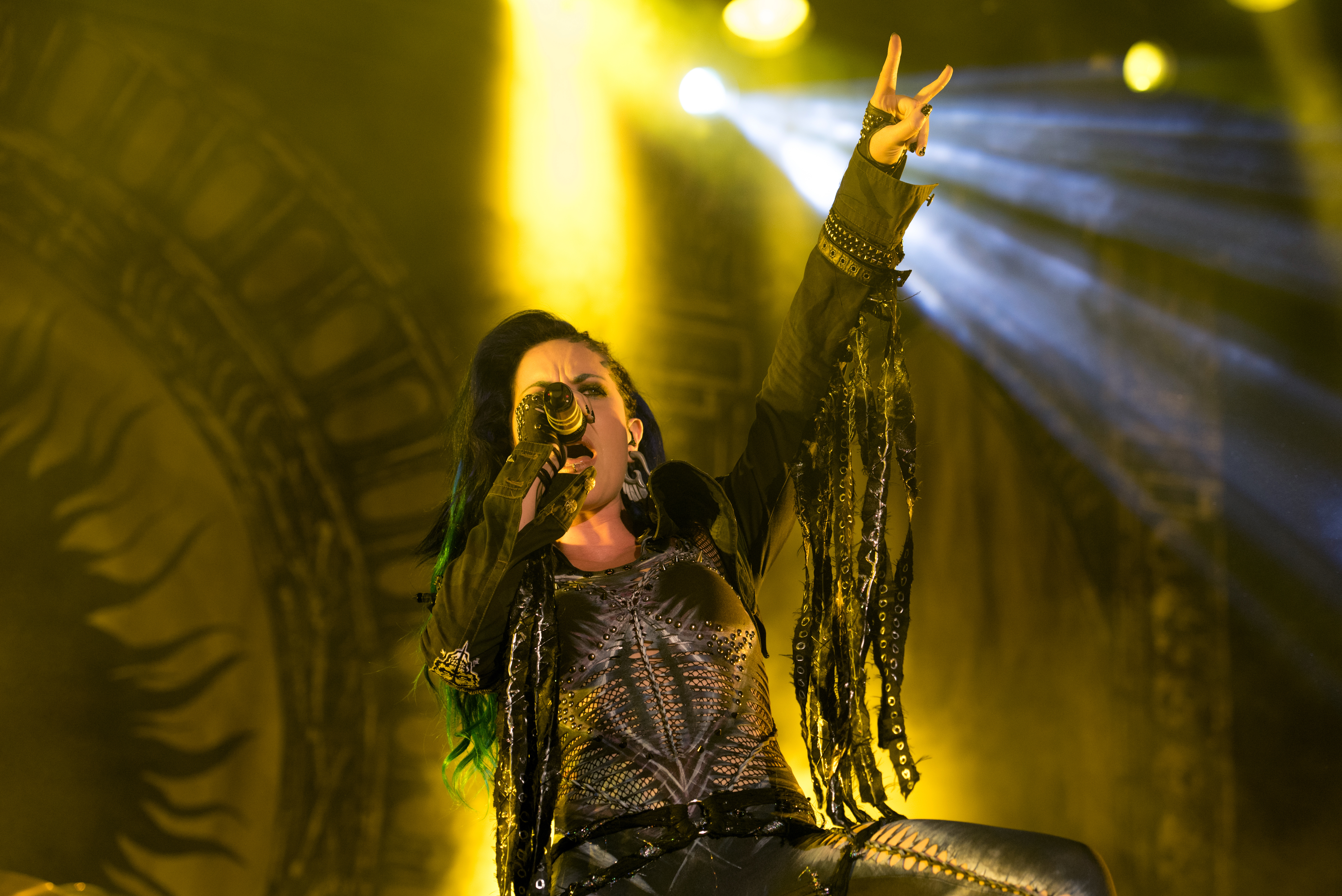 Arch Enemy beim Reload Festival 2016 in Sulingen